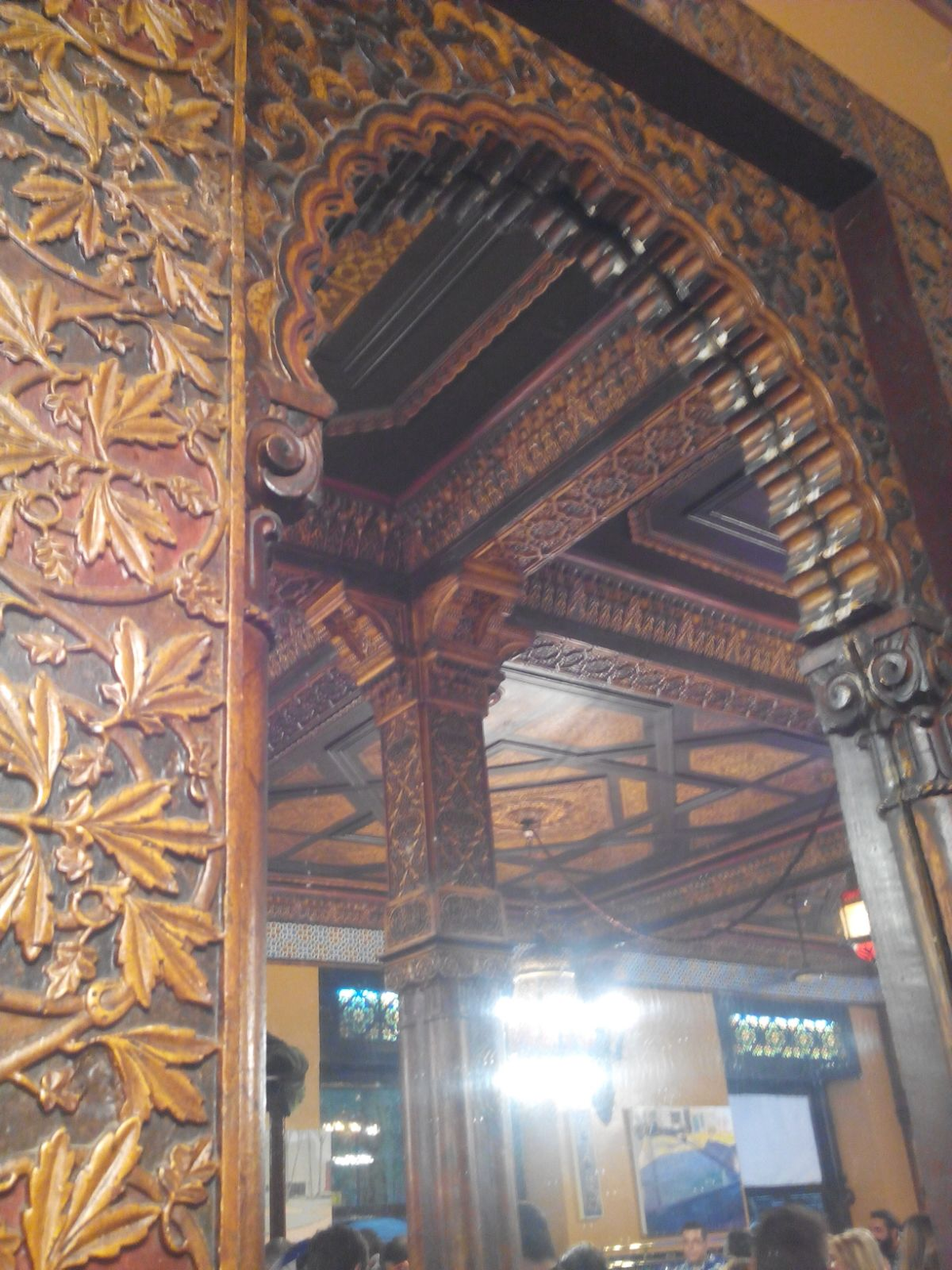 Café Iruña en Bilbao.